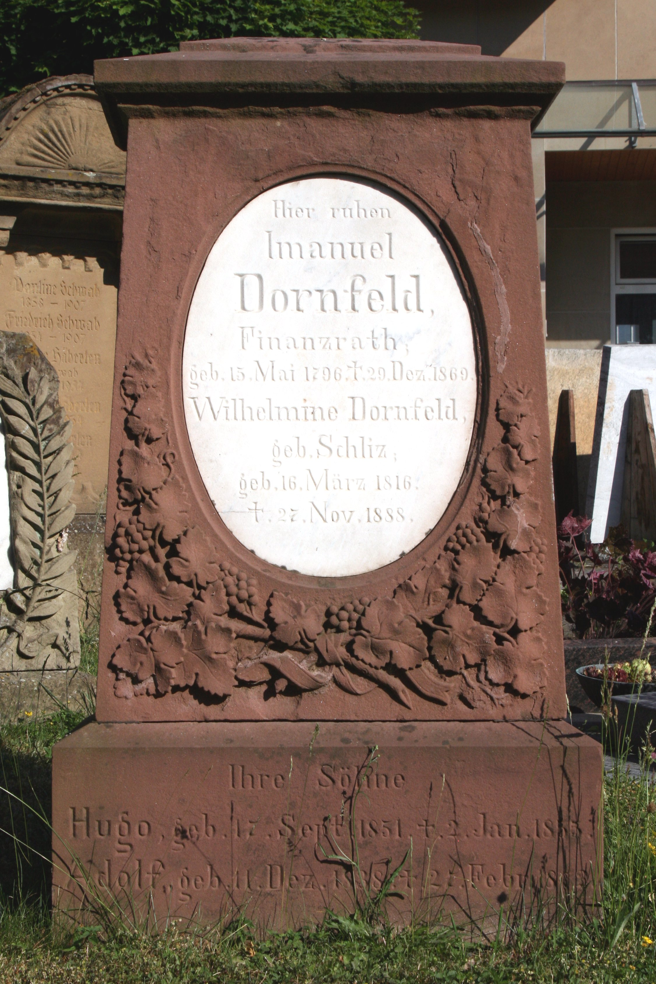 Grabstein Immanuel Dornfelds, heute auf dem Gelände eines Steinmetzen in Weinsberg aufgestellt.